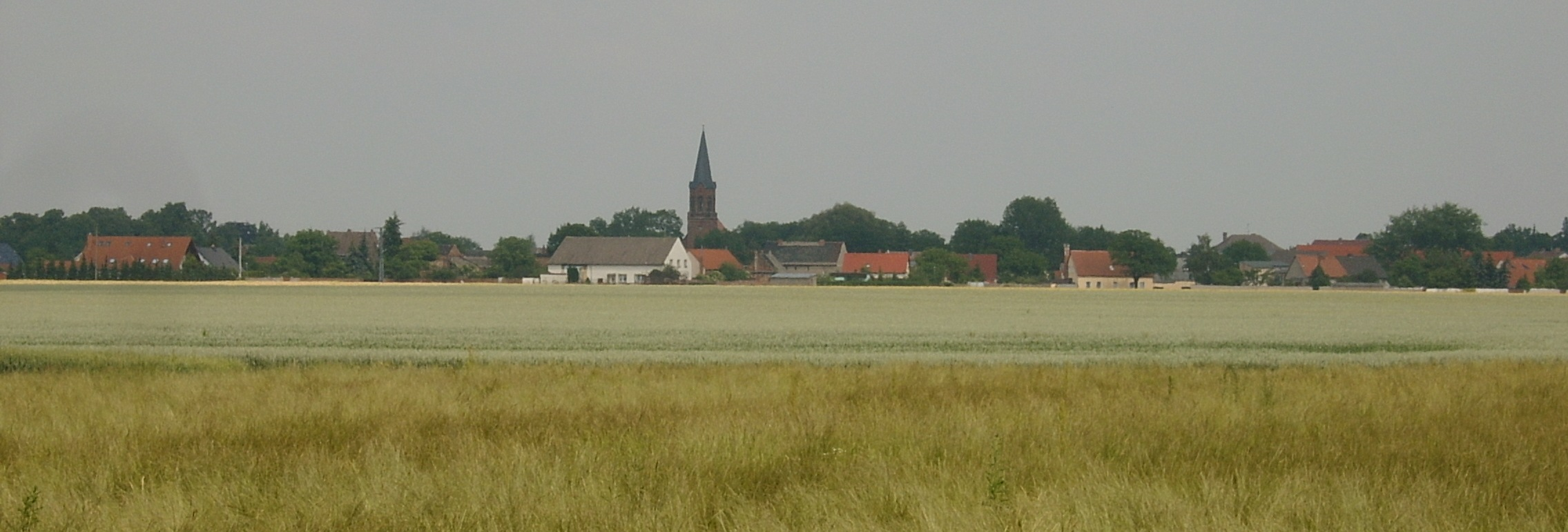 Blick auf Osternienburg vom Friedhof in Pißdorf